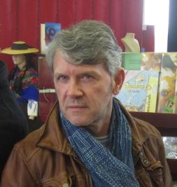 O actor galego Luís Iglesia.